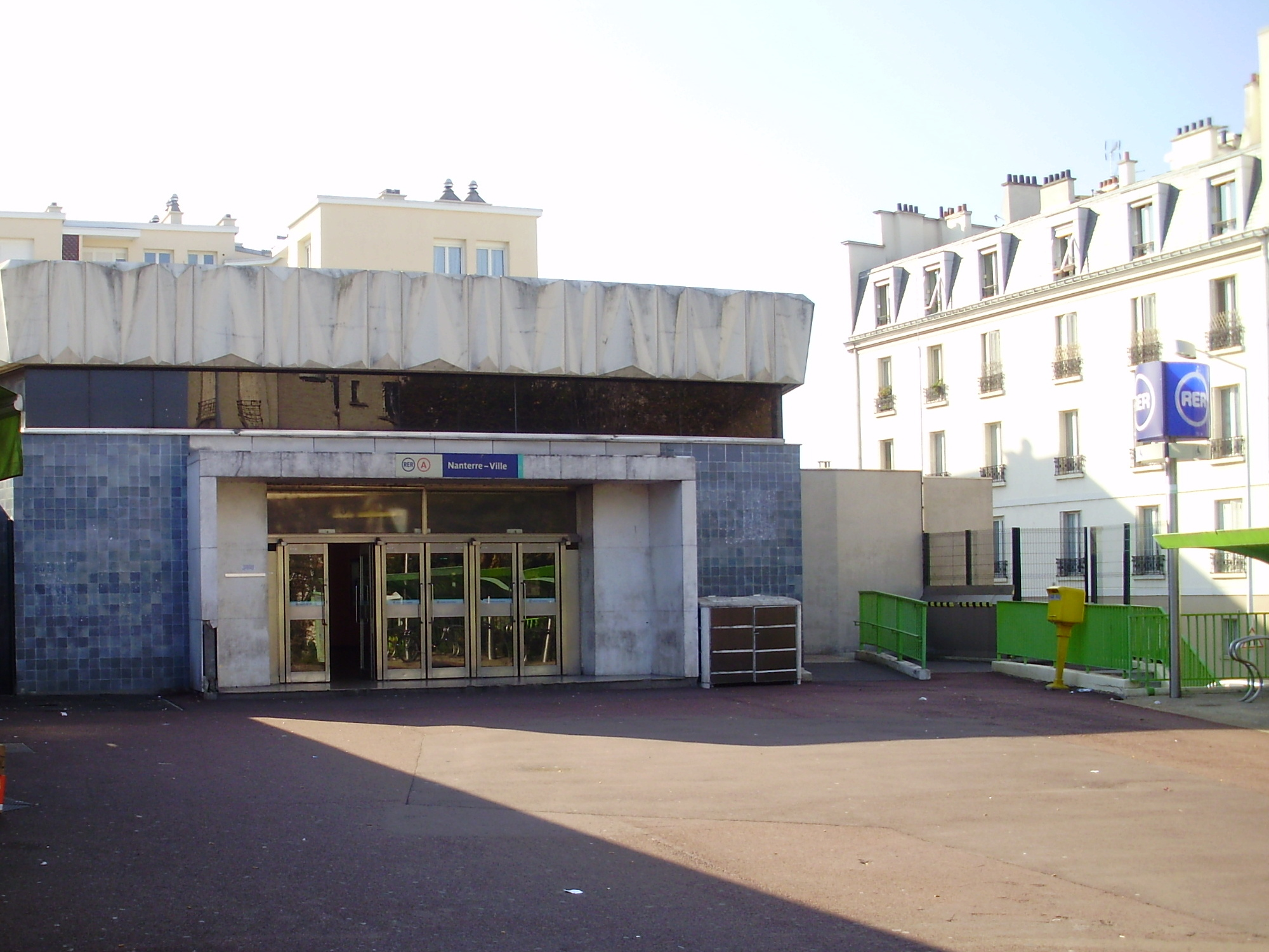 Gare de Nanterre-Ville, Hauts-de-Seine, France : entrée principale au nord des voies